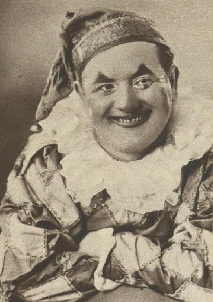 Vojta Merten (1895-1945), Kašpárek